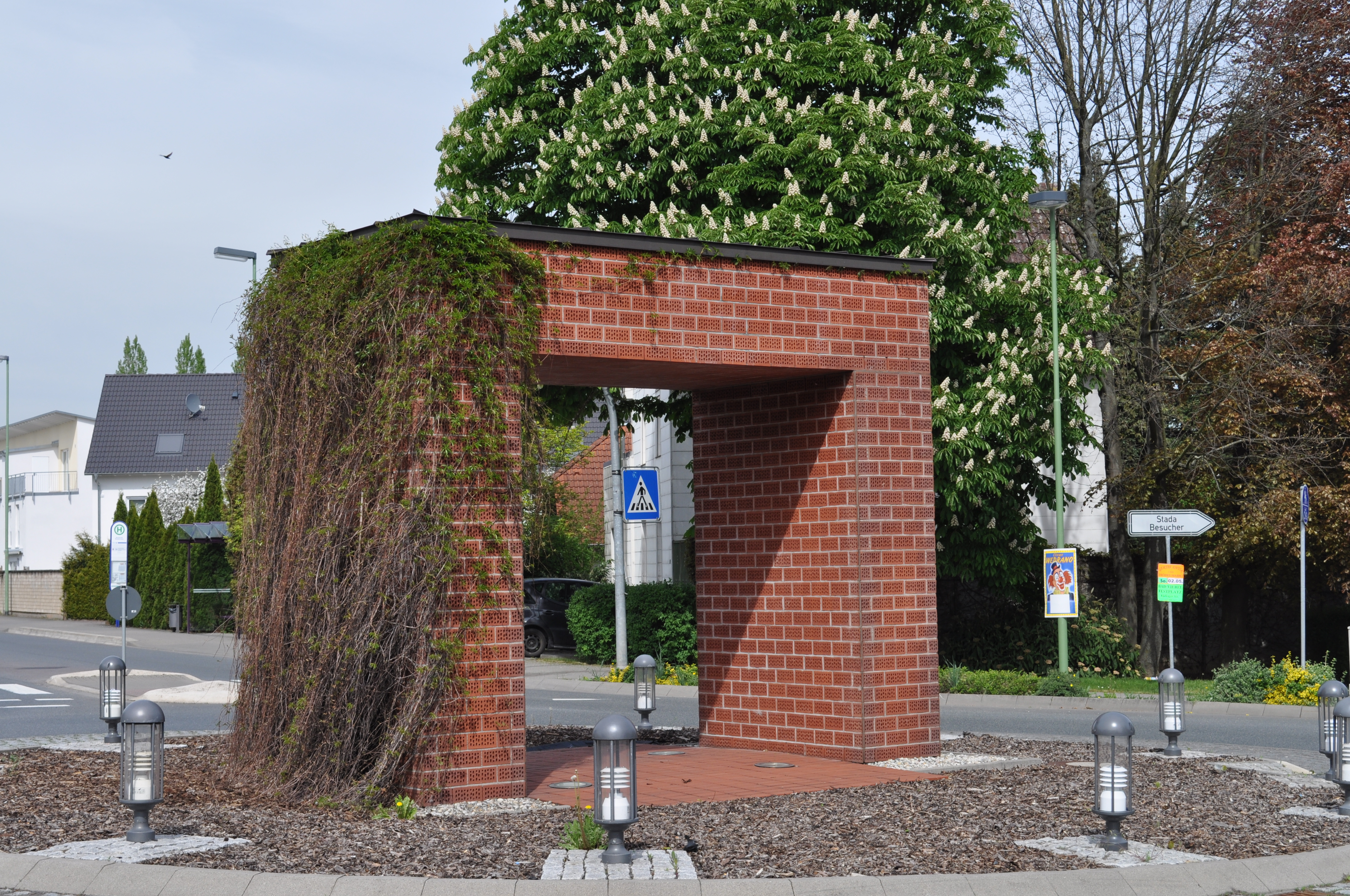 Dortelweil: das "Torhaus" auf der Friedberger Straße gegenüber First Data Deutschland.